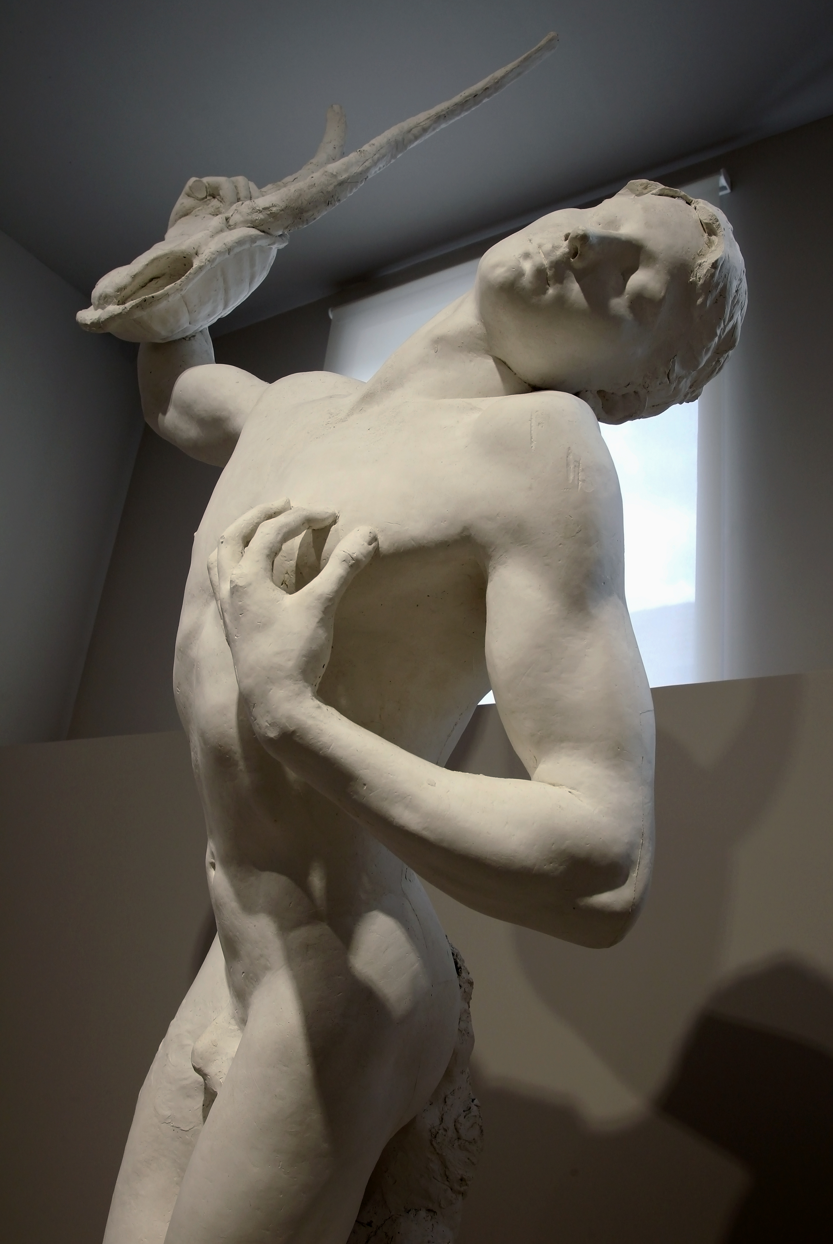 Le Rêve ( détail ), plâtre,1893, par Émile Laporte ( 1858-1907 ). Inv.1907.15. Musée Camille Claudel, salle 6 ( "Allégories, mythologie").